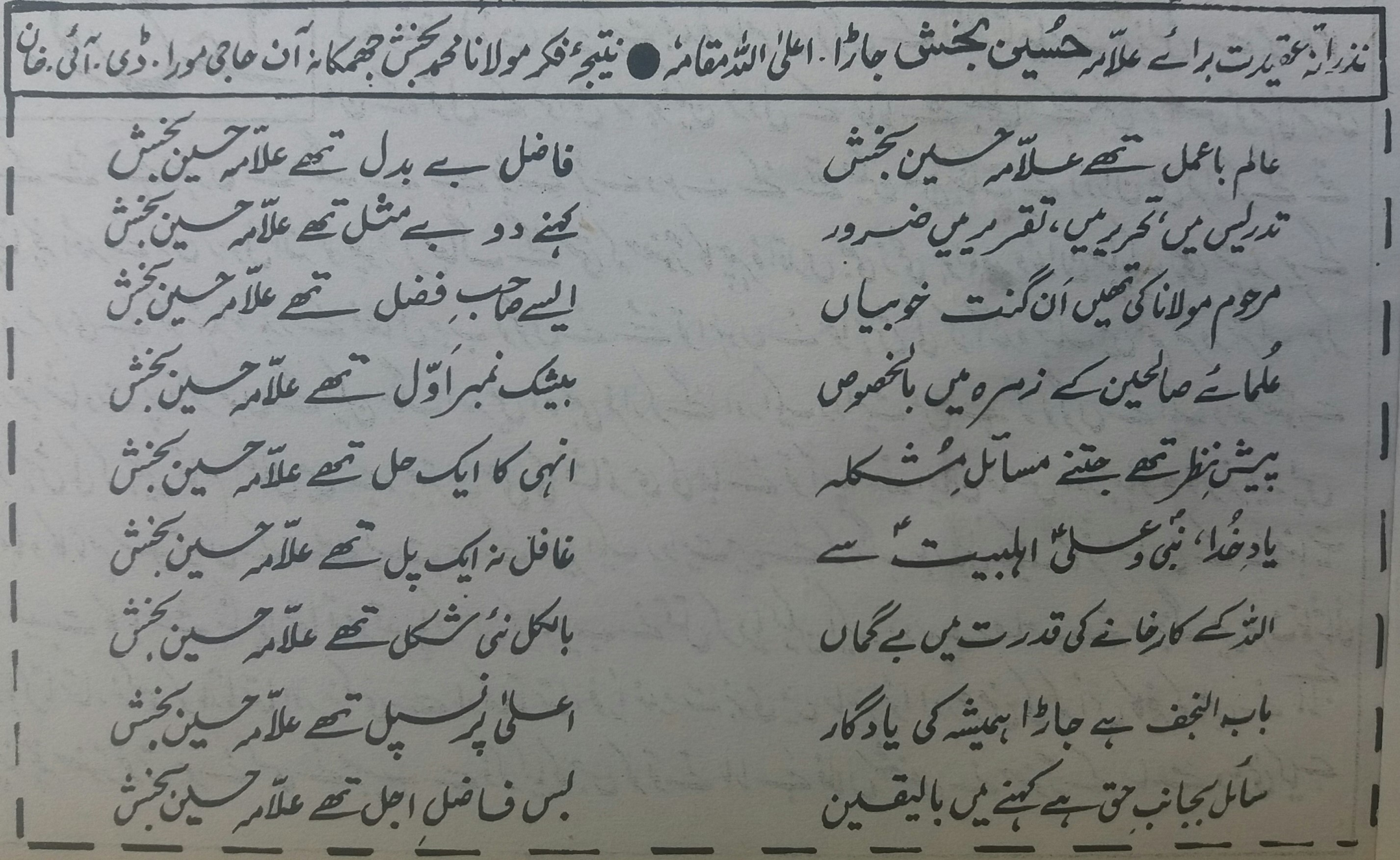 نتیجہ فکر : شاعر آل عبا مولانا محمد بخش جھمکانہ مرحوم